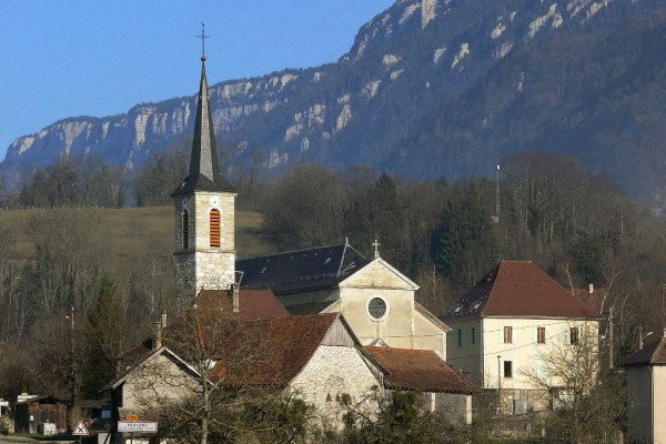 Village de Berland, Commune de Saint-Christophe-sur-Guiers, Isère, France.